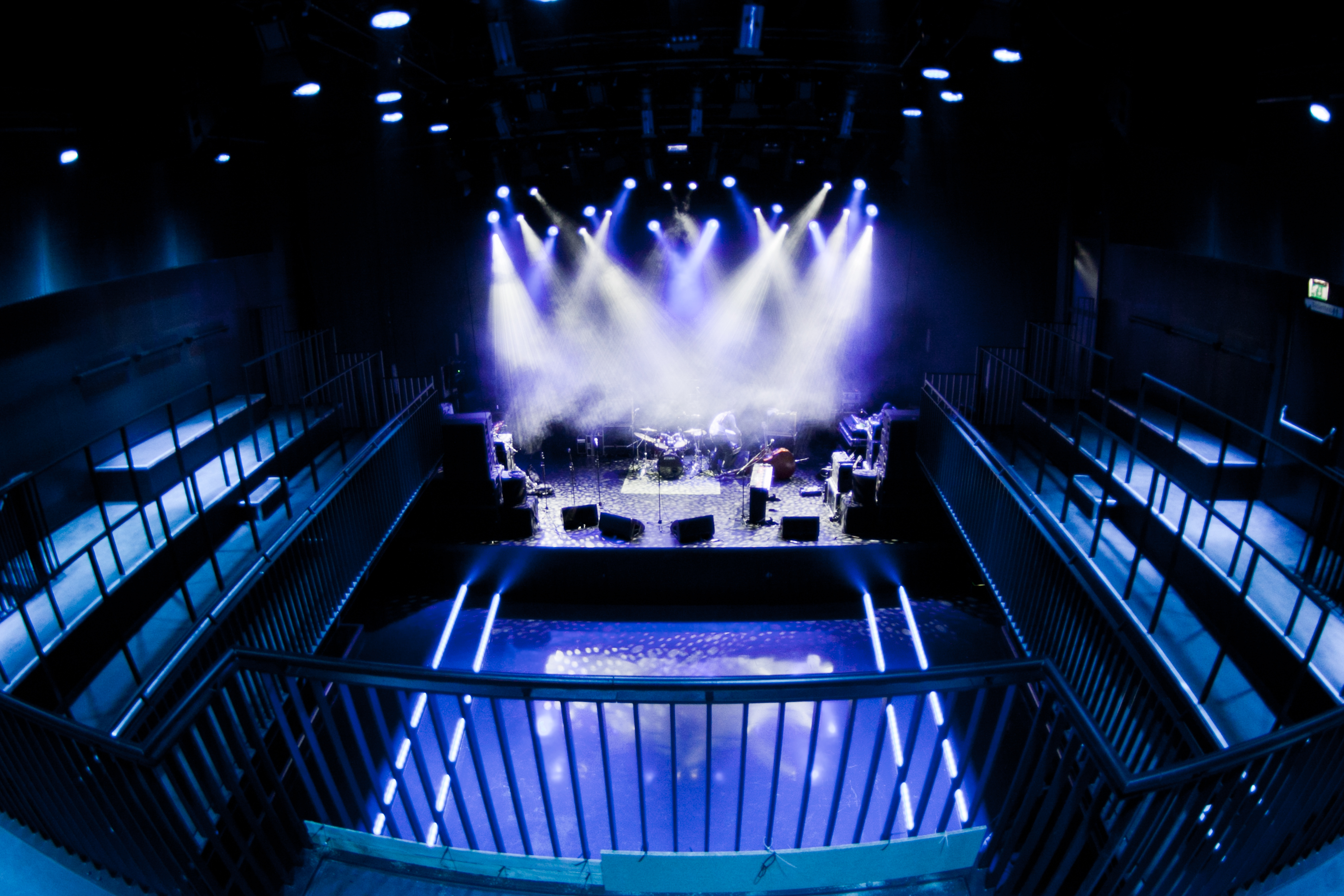 De Main Stage is de grootste zaal van Poppodium Bibelot met een capaciteit van 800 bezoekers.